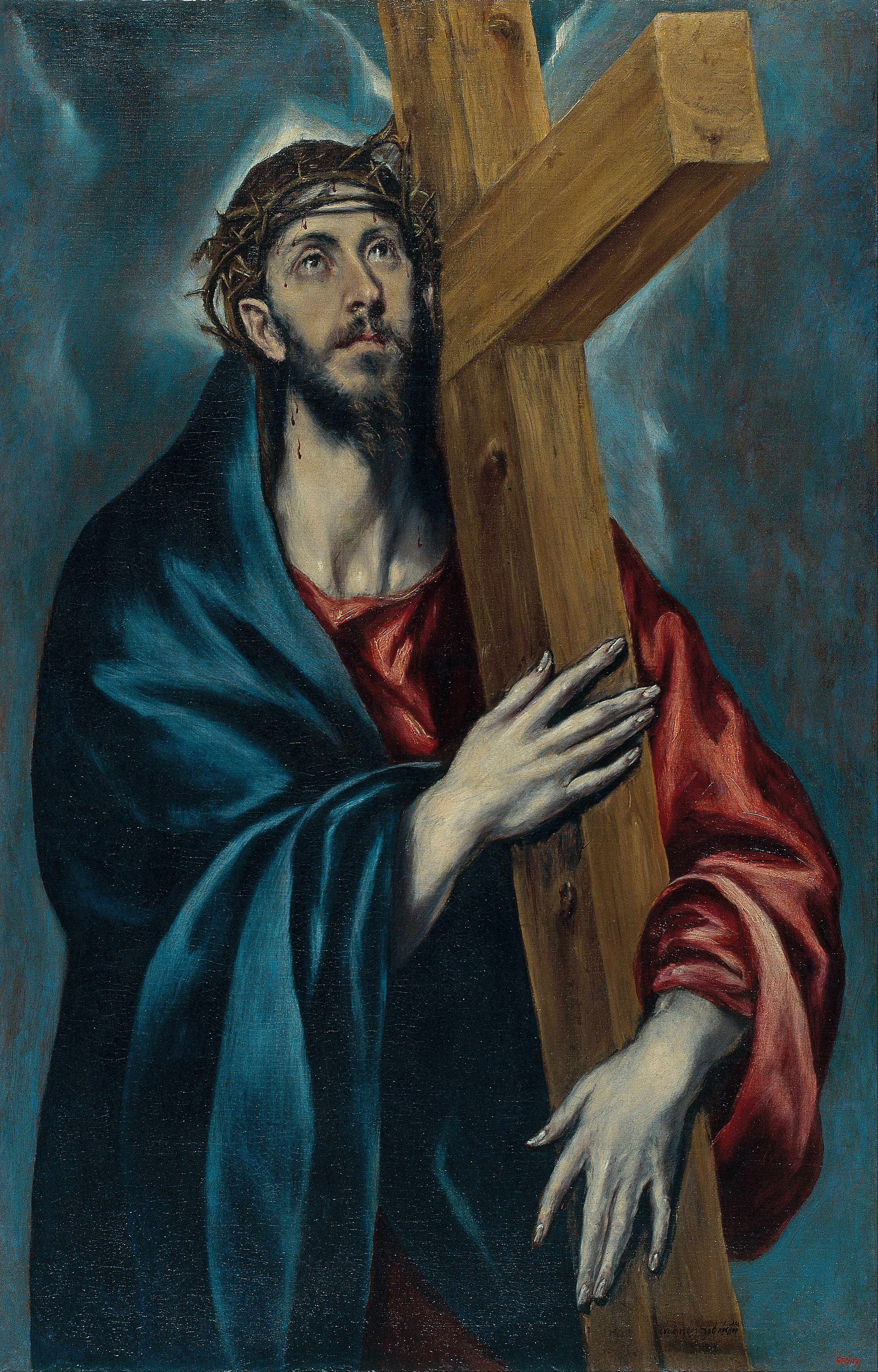 La obra representa a Jesucristo cargando con la cruz y con la mirada puesta en el cielo.